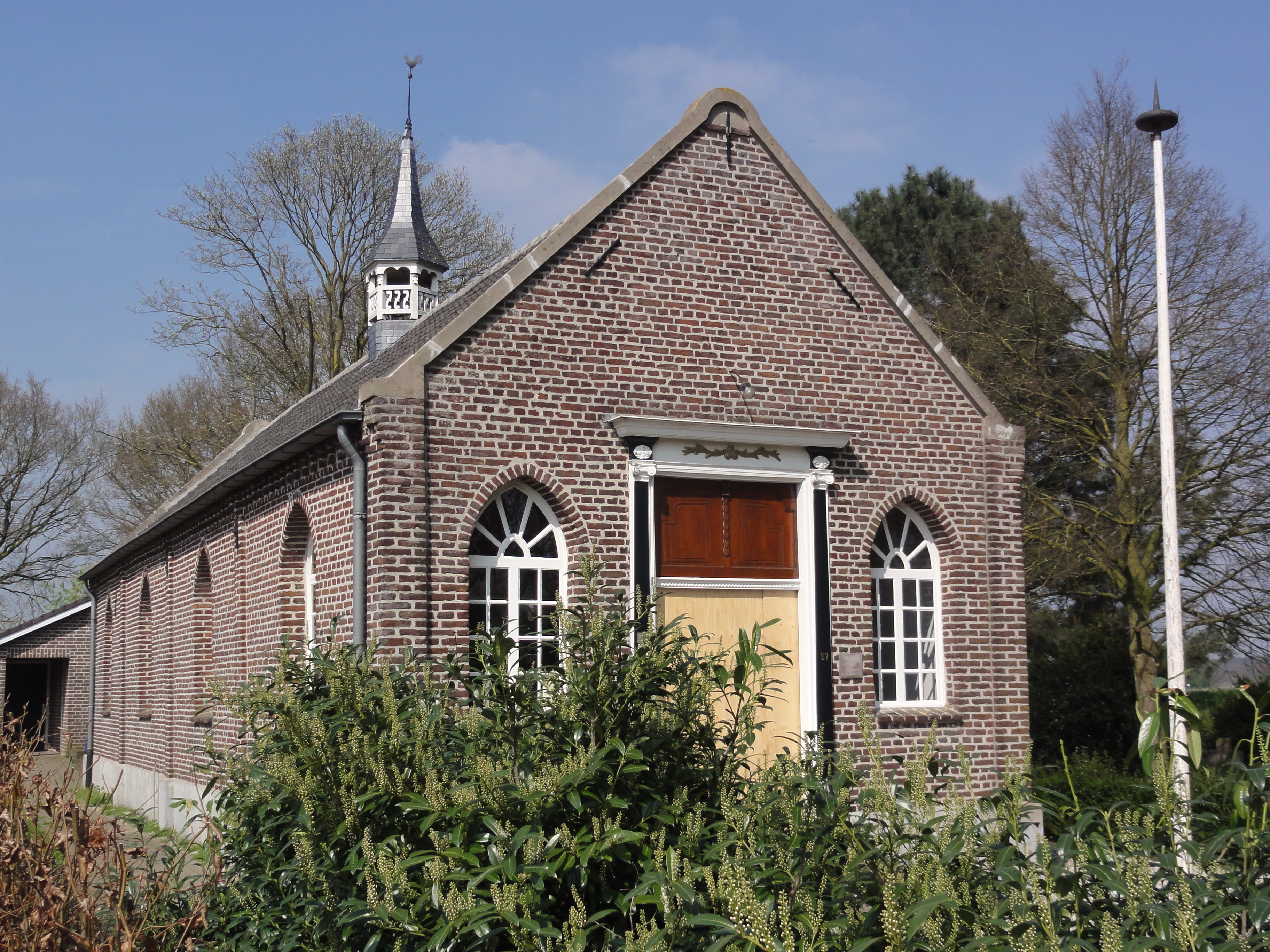 Venray Blitterswijck, H. kerk, Maasweg